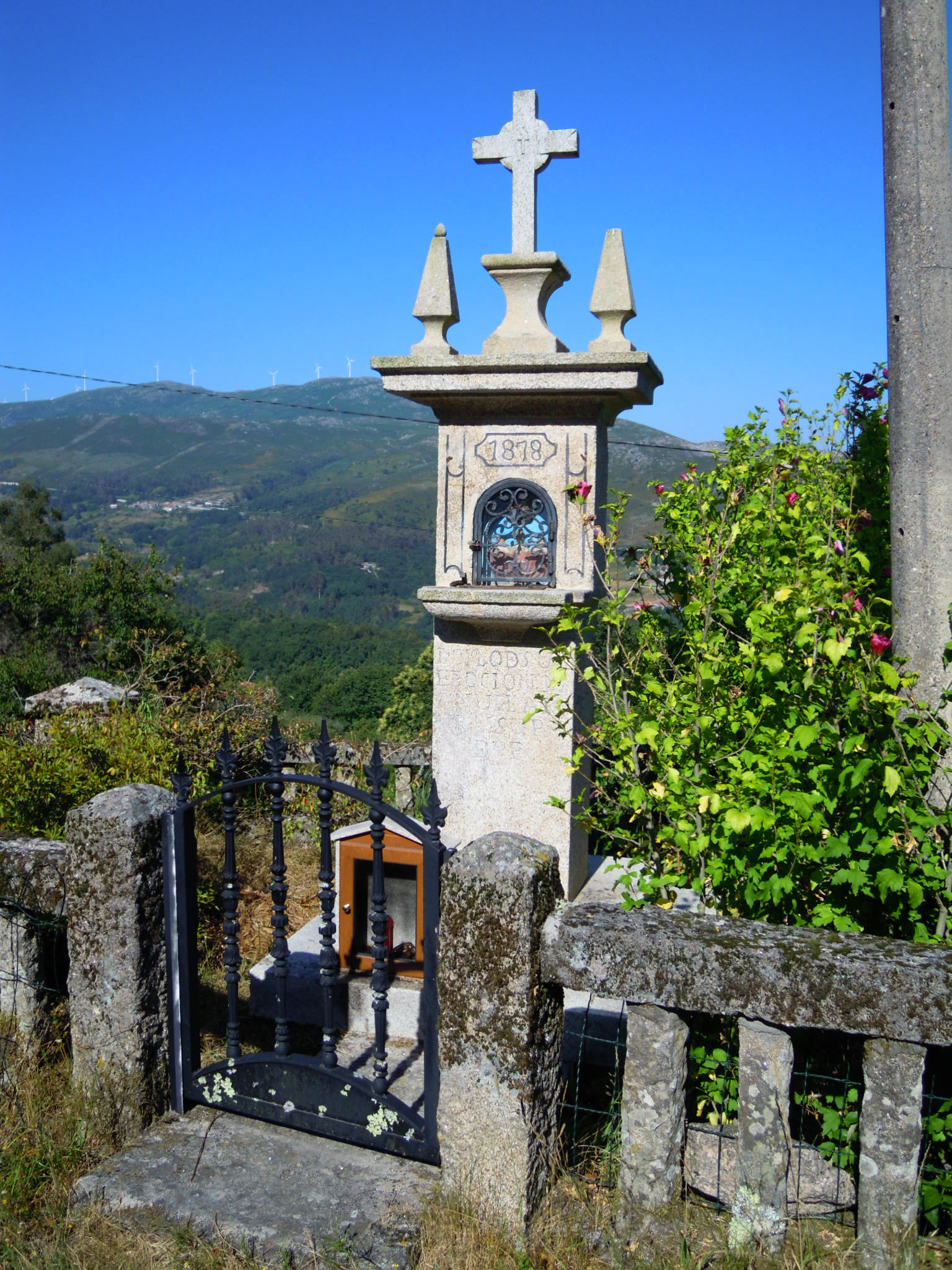 Peto de ánimas da Meixoa, en Ceraxe de Arriba (Aguasantas, Cerdedo-Cotobade).